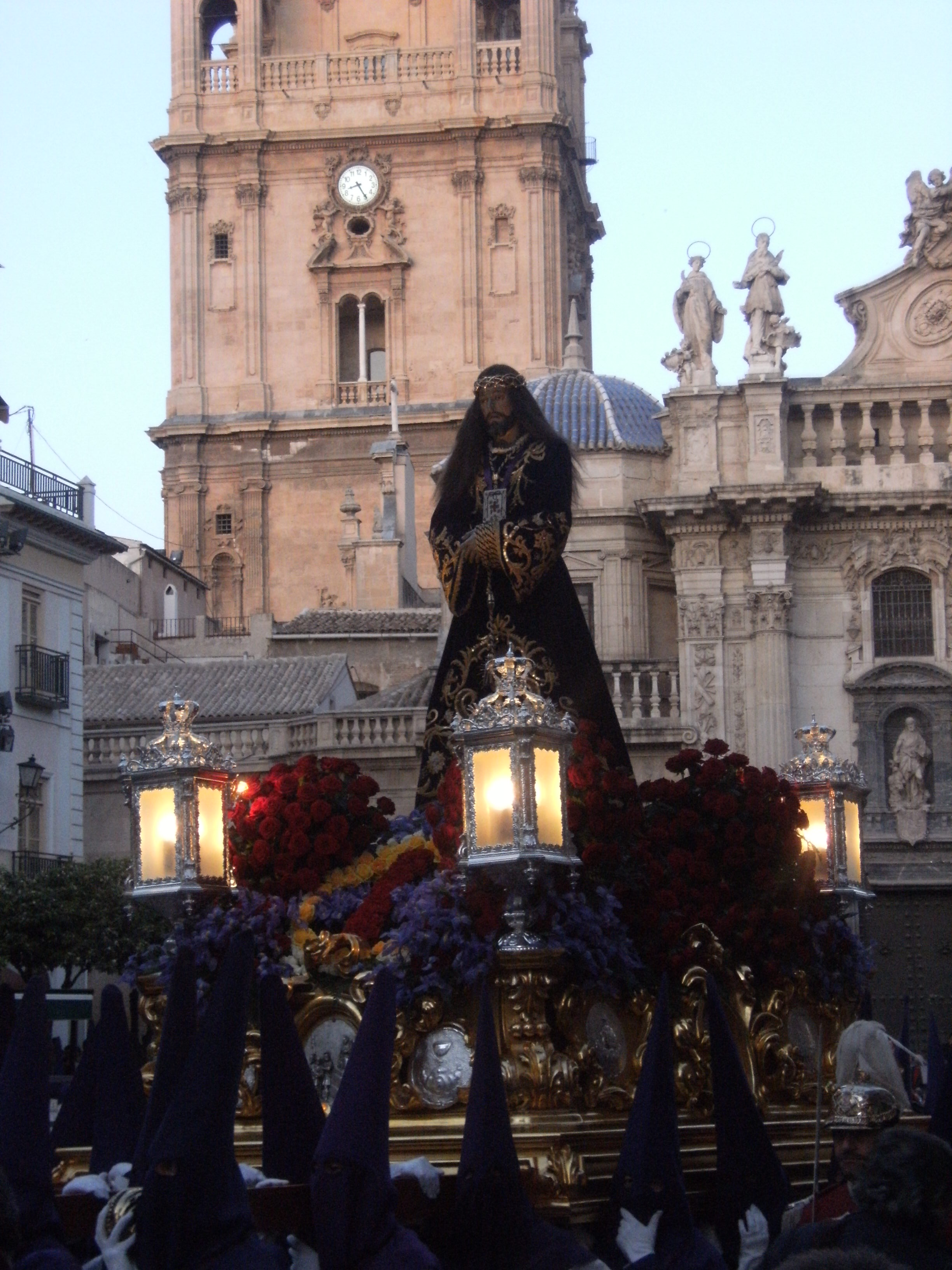 Paso de Nuestro Padre Jesús del Rescate a su paso por la Plaza de Belluga de Murcia (Región de Murcia, España). Imagen anónima del siglo XVII, titular de la Hermandad del mismo nombre.